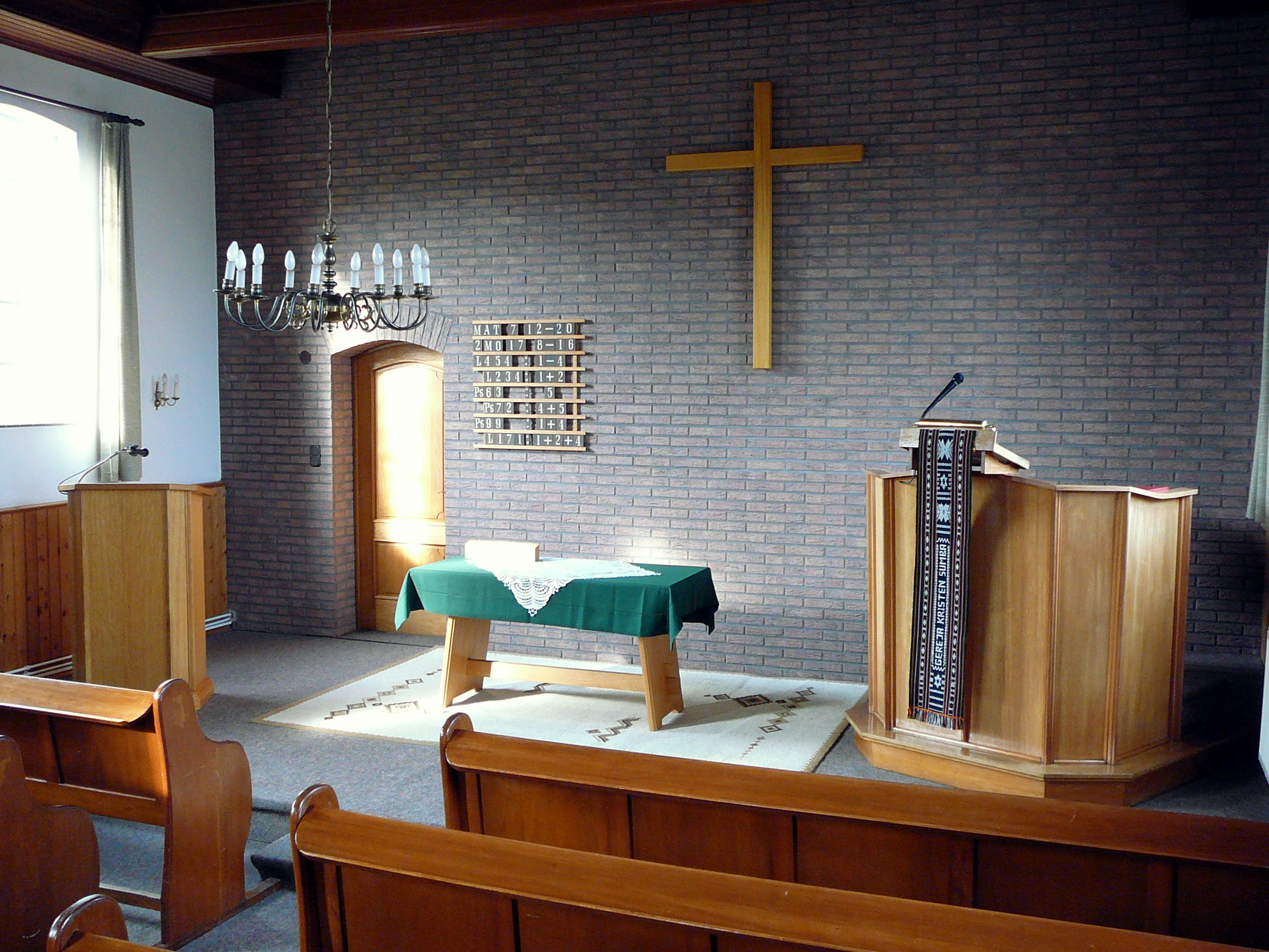 Innenraum der Altreformierten Kirche, Neermoor, Ostfriesland